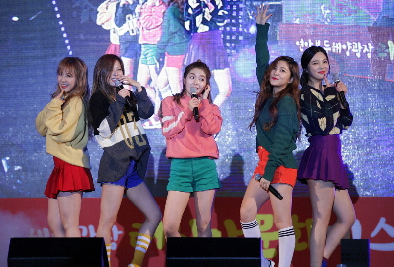 레드벨벳(Red Velvet) 러시아 문화 페스티벌 인천 연안부두 해양광장